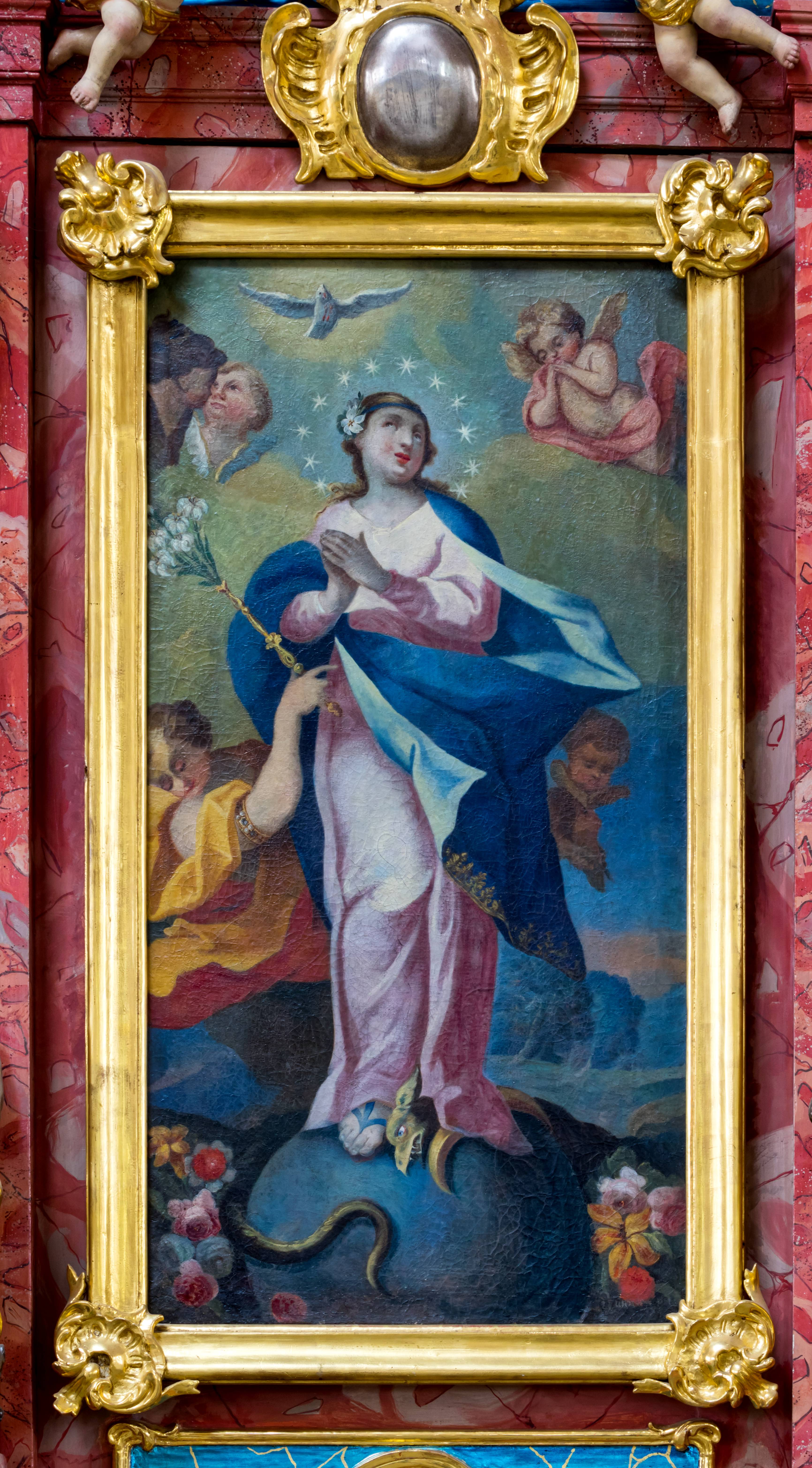 Bilder von St. Columba. in Pfaffenweiler Linker Seitenaltar